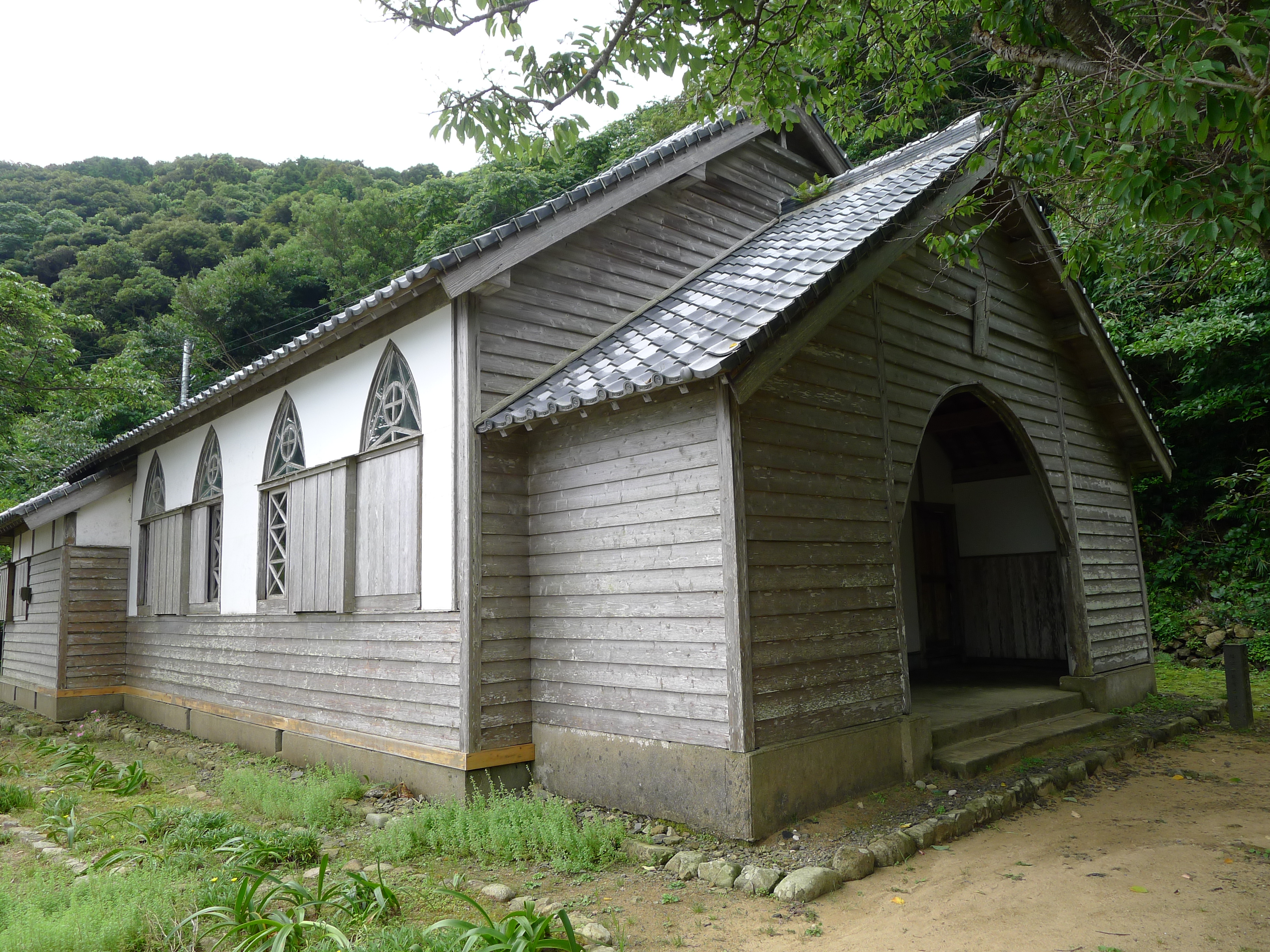 久賀島の旧五輪教会外観